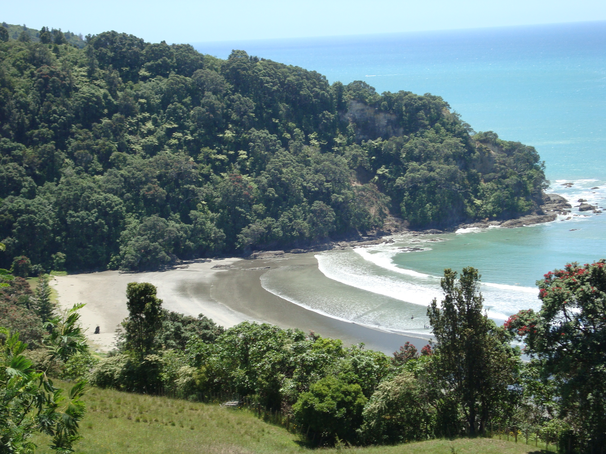 Ohope Beach som ligger 7 km fra Whakatane.